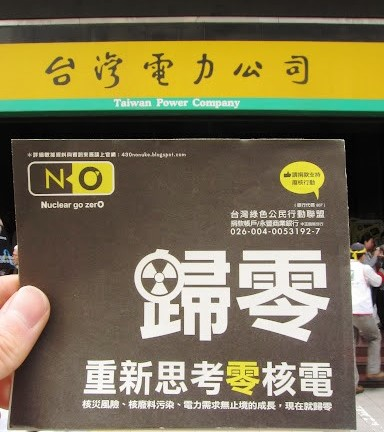 中文（台灣）: 2013年3月9日至10日 309廢核大遊行 台灣綠色公民行動聯盟核電歸零廣告單